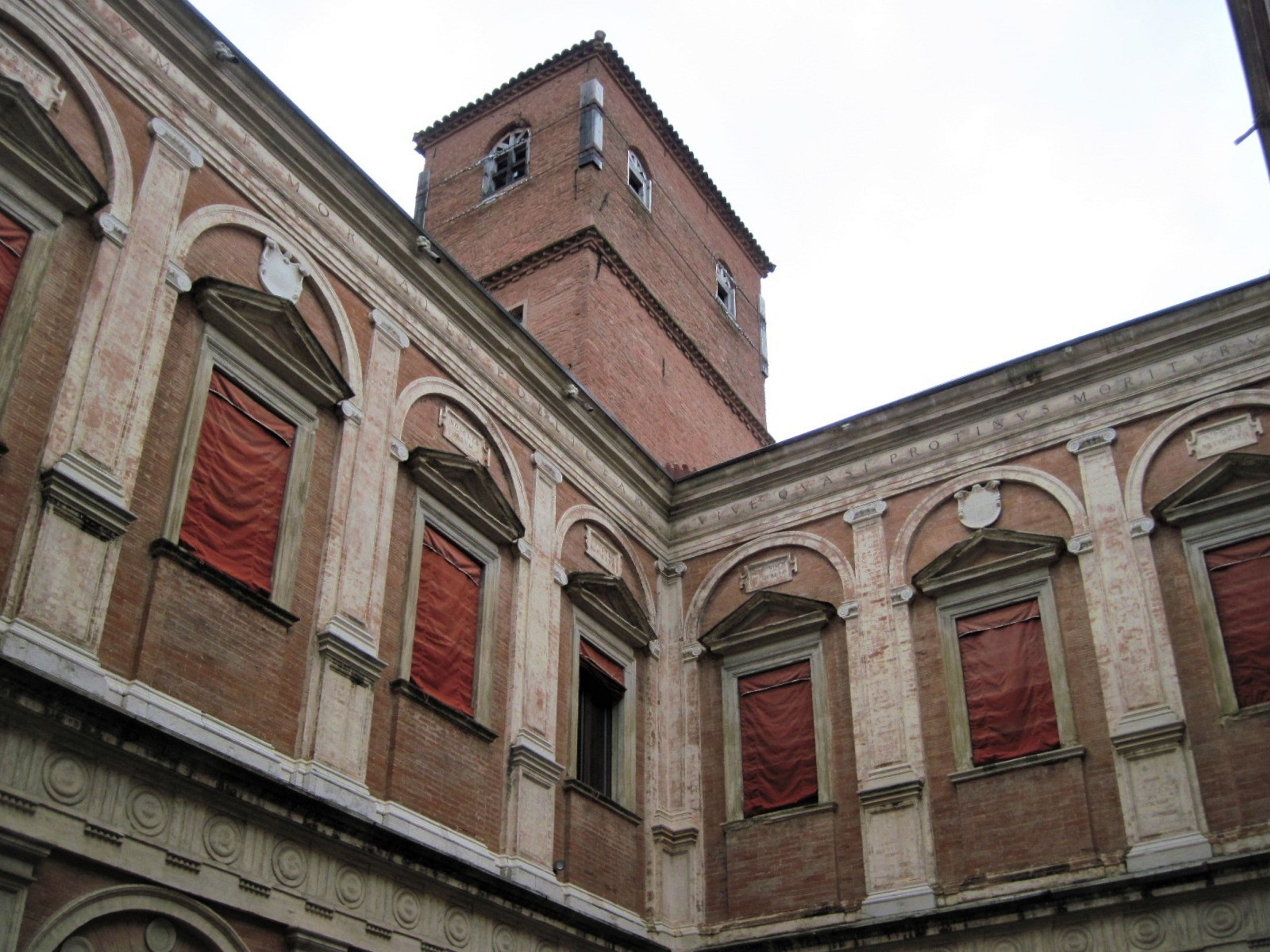 Palazzo Naselli Crispi in via Borgoleoni a Ferrara. Cortile e torretta.